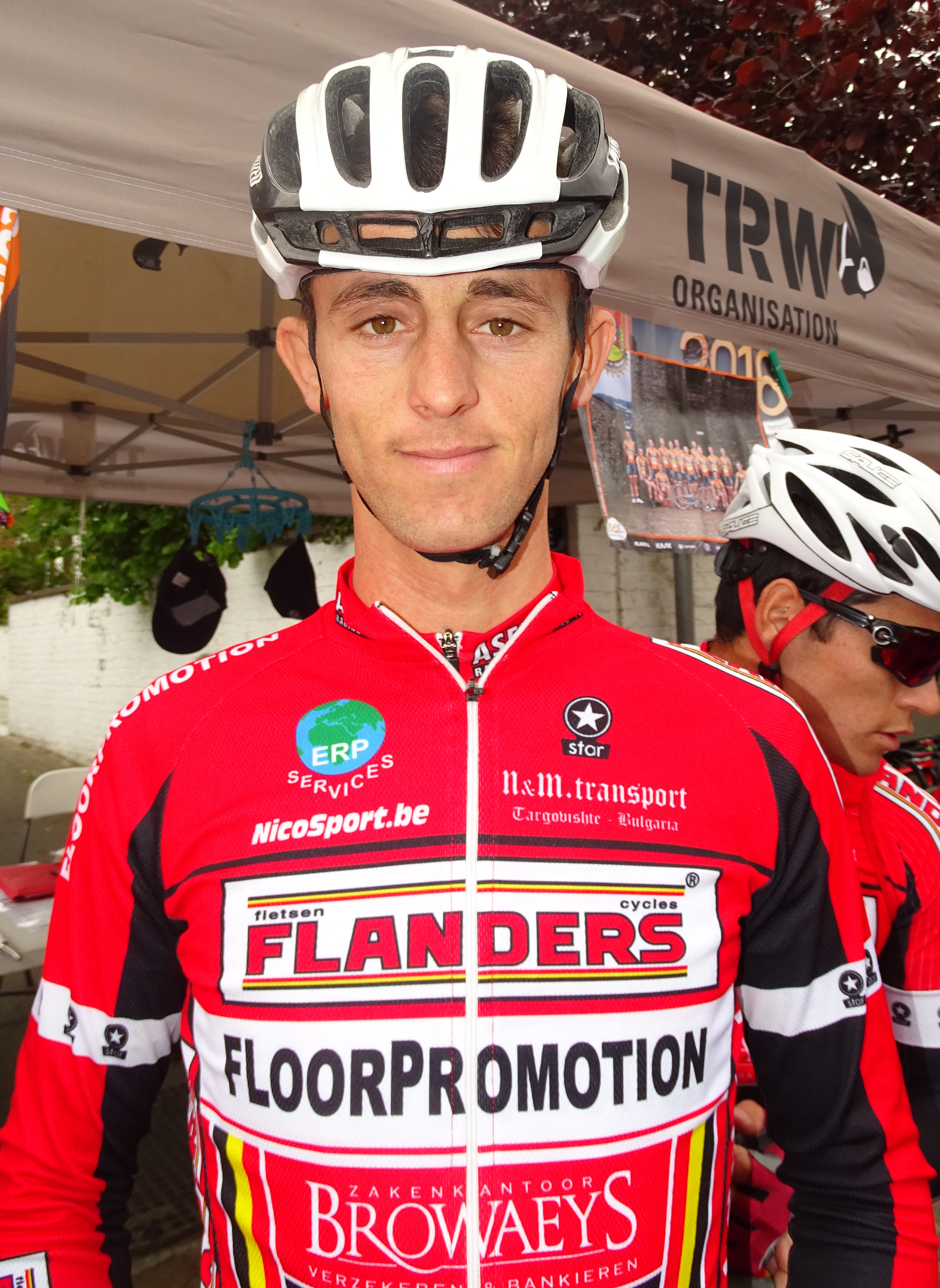 Reportage réalisé le dimanche 15 mai à l'occasion du départ du Grand Prix Criquielion 2016 à Silly, Belgique.